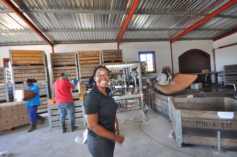 Ntsiki Biyela in ihrem neuen Weinkeller